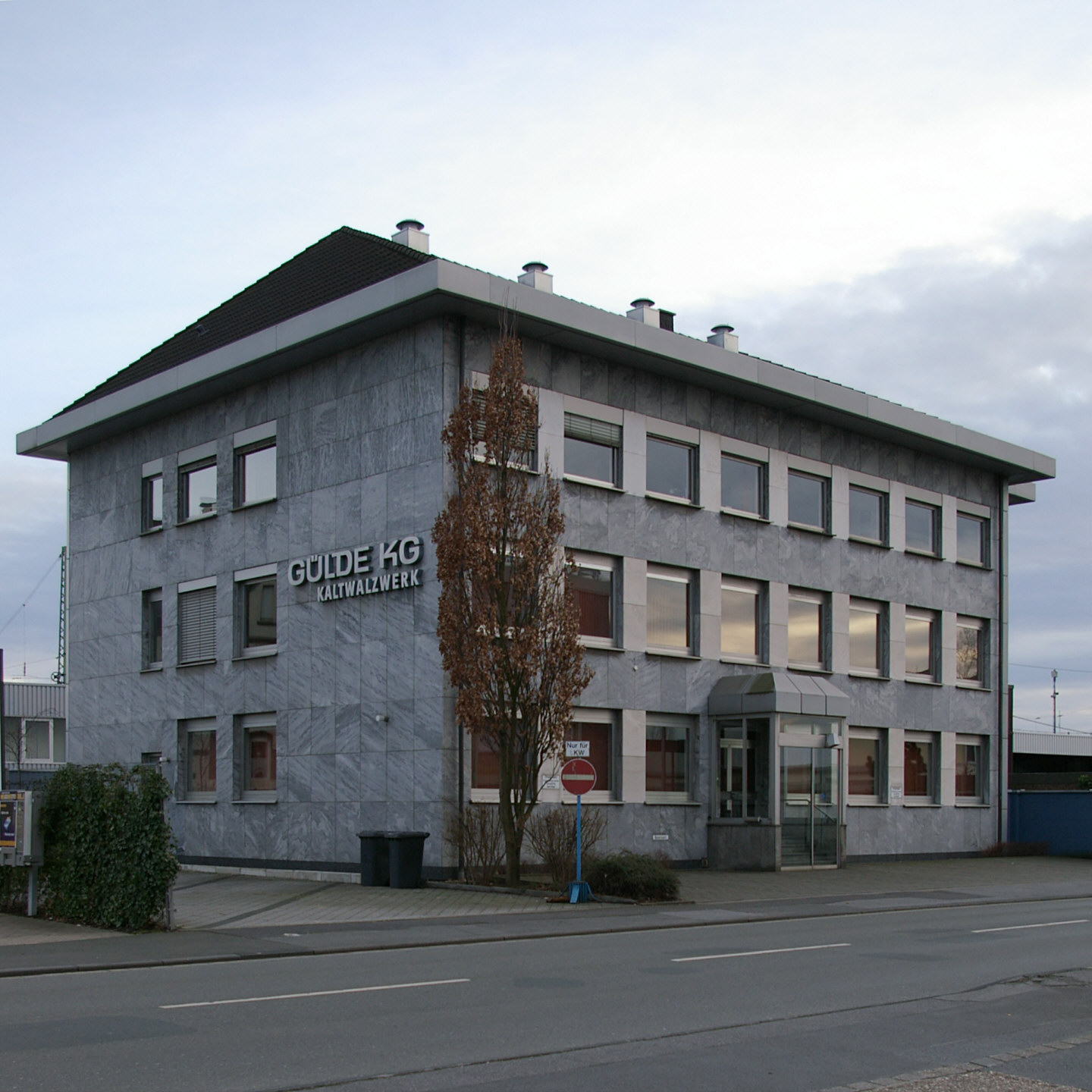 Verwaltungsgebäude des Kaltwalzwerks Gülde in Kamen, Nordrhein-Westfalen